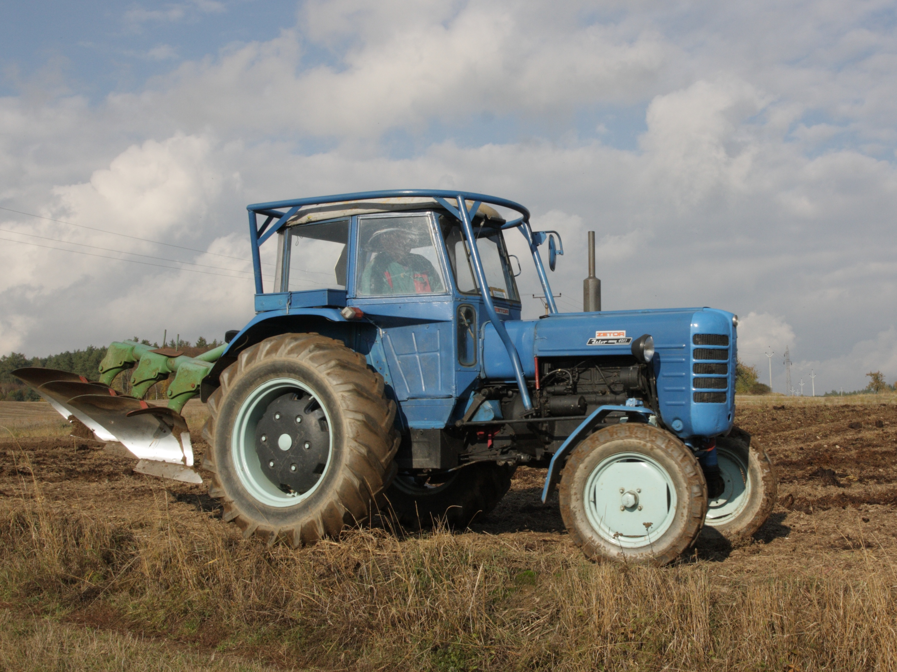 Zetor 4011 při orbě u vsi Jilmoví, okres Brno-venkov.